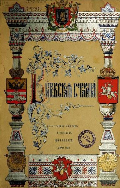 Сборник «Витебская старина»